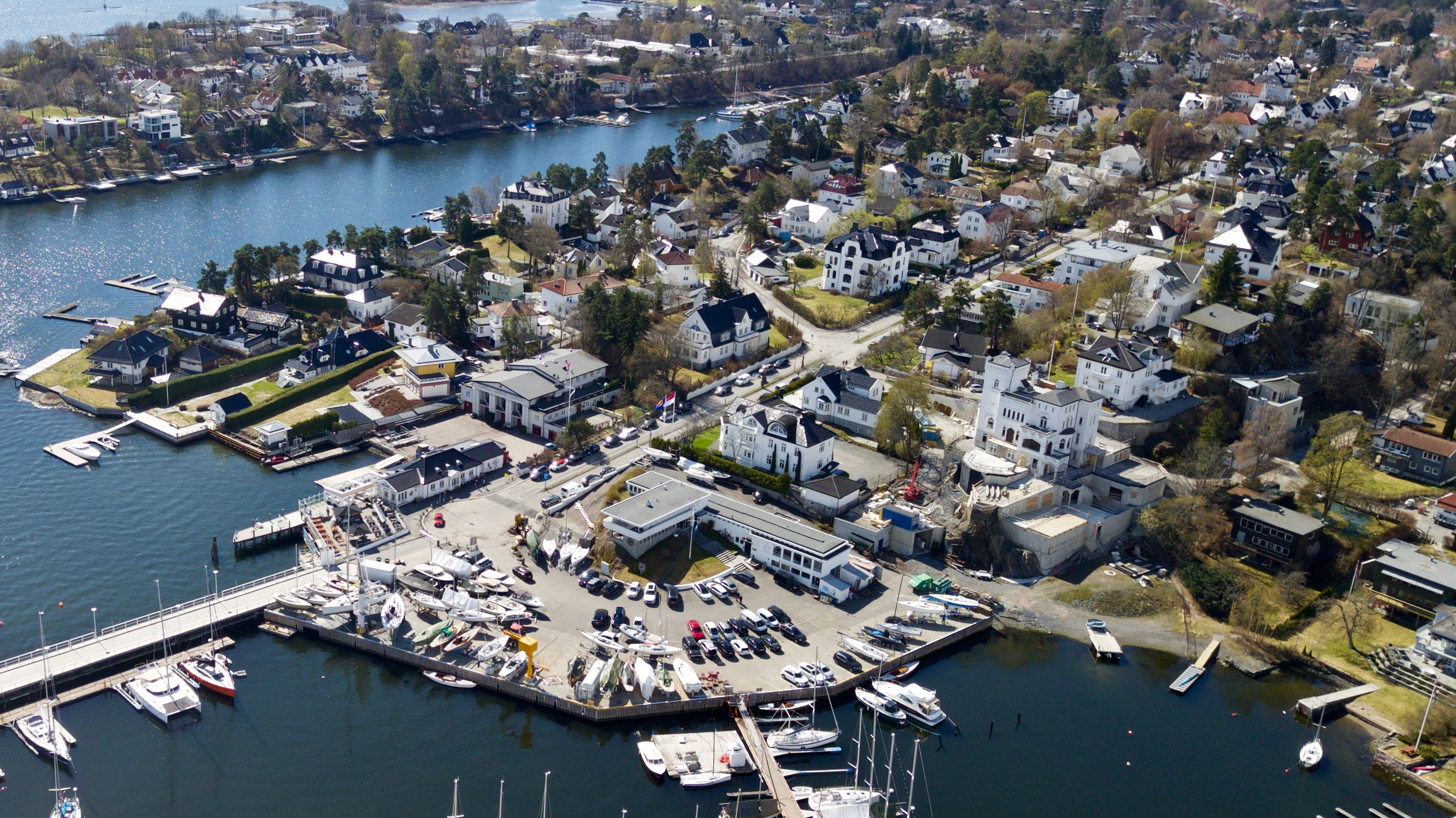 Huk aveny i Oslo.